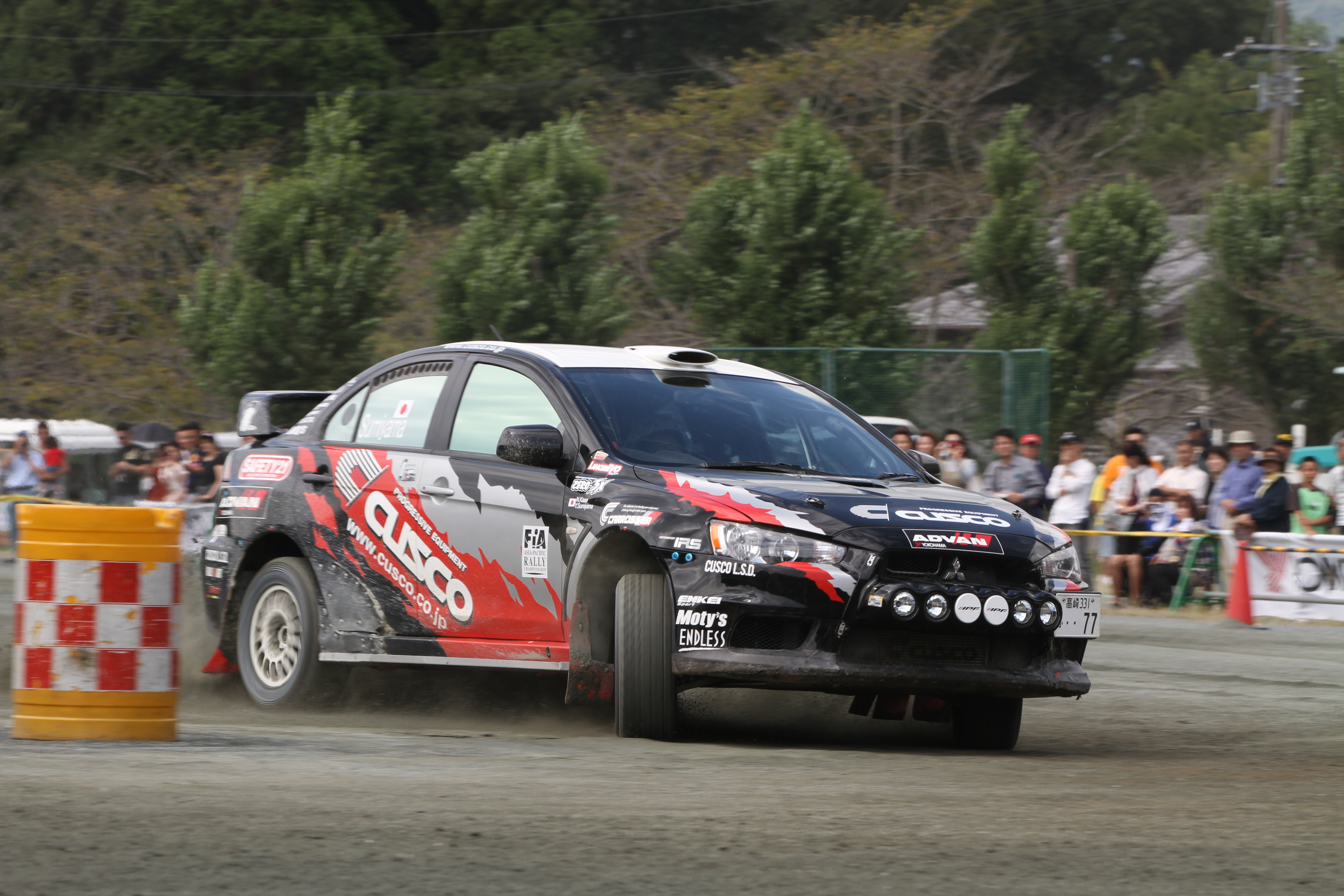 新城ラリー2010